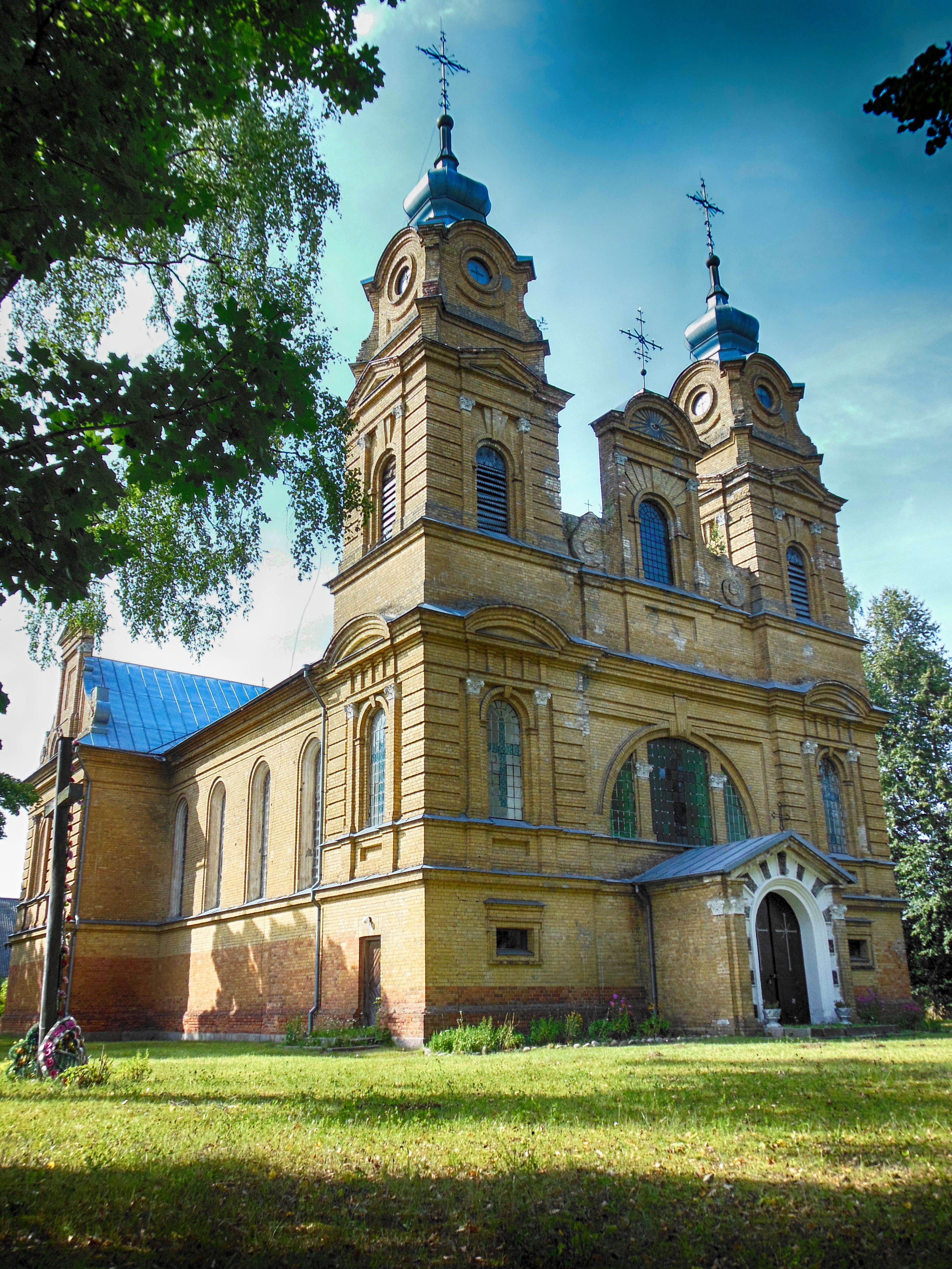 Беларуская (тарашкевіца): Касьцёл Божага Цела ў в. Дварэц Дзятлаўскага раёну